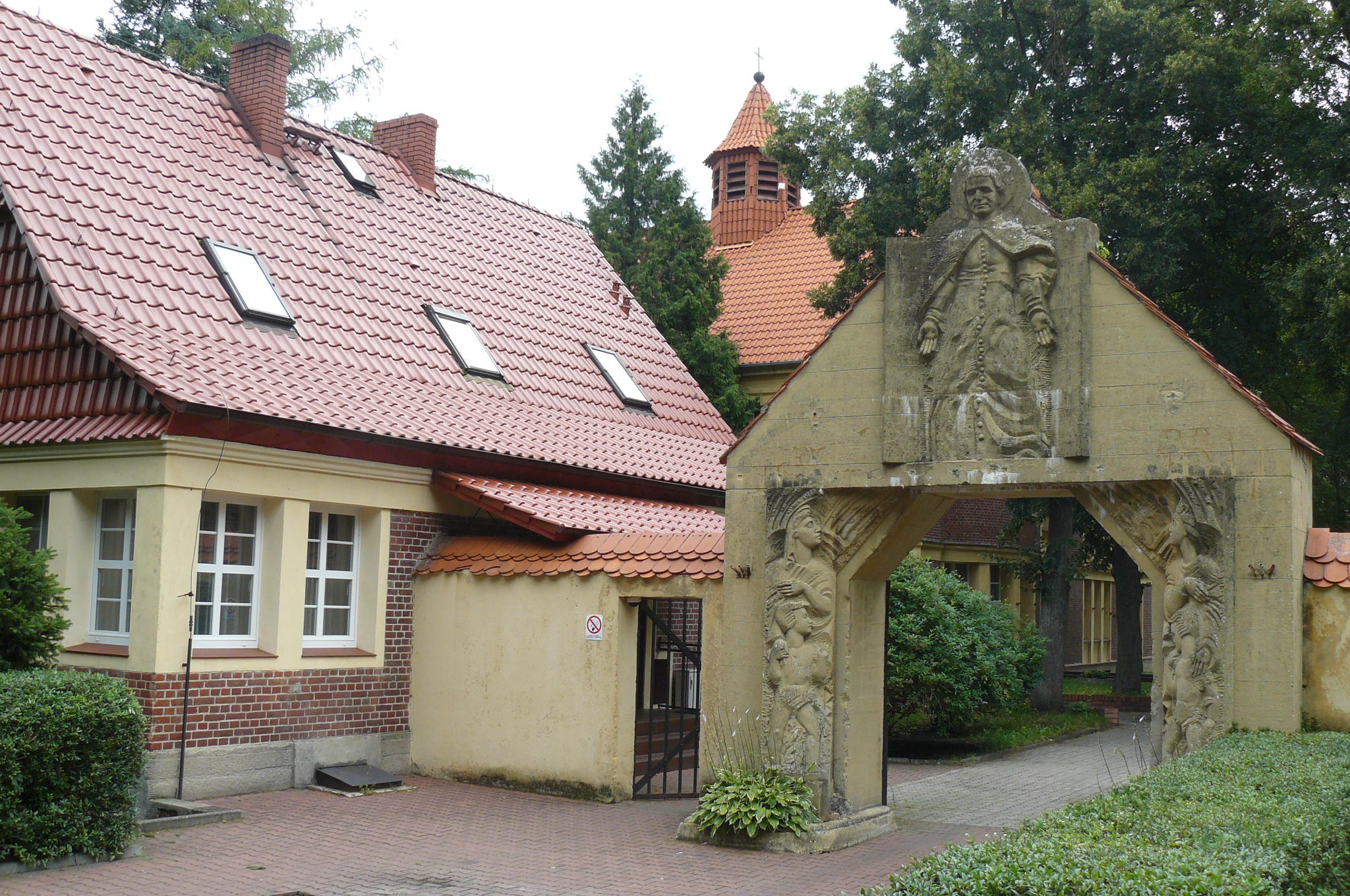 Młodzieżowy Ośrodek Wychowawczy im. Janusza Korczaka w Antoniewie (1914r., brama z 1938r.).